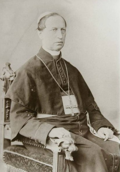 Bernhard Höting (1821-1898). Historische Fotografie aus dem 19. Jh.